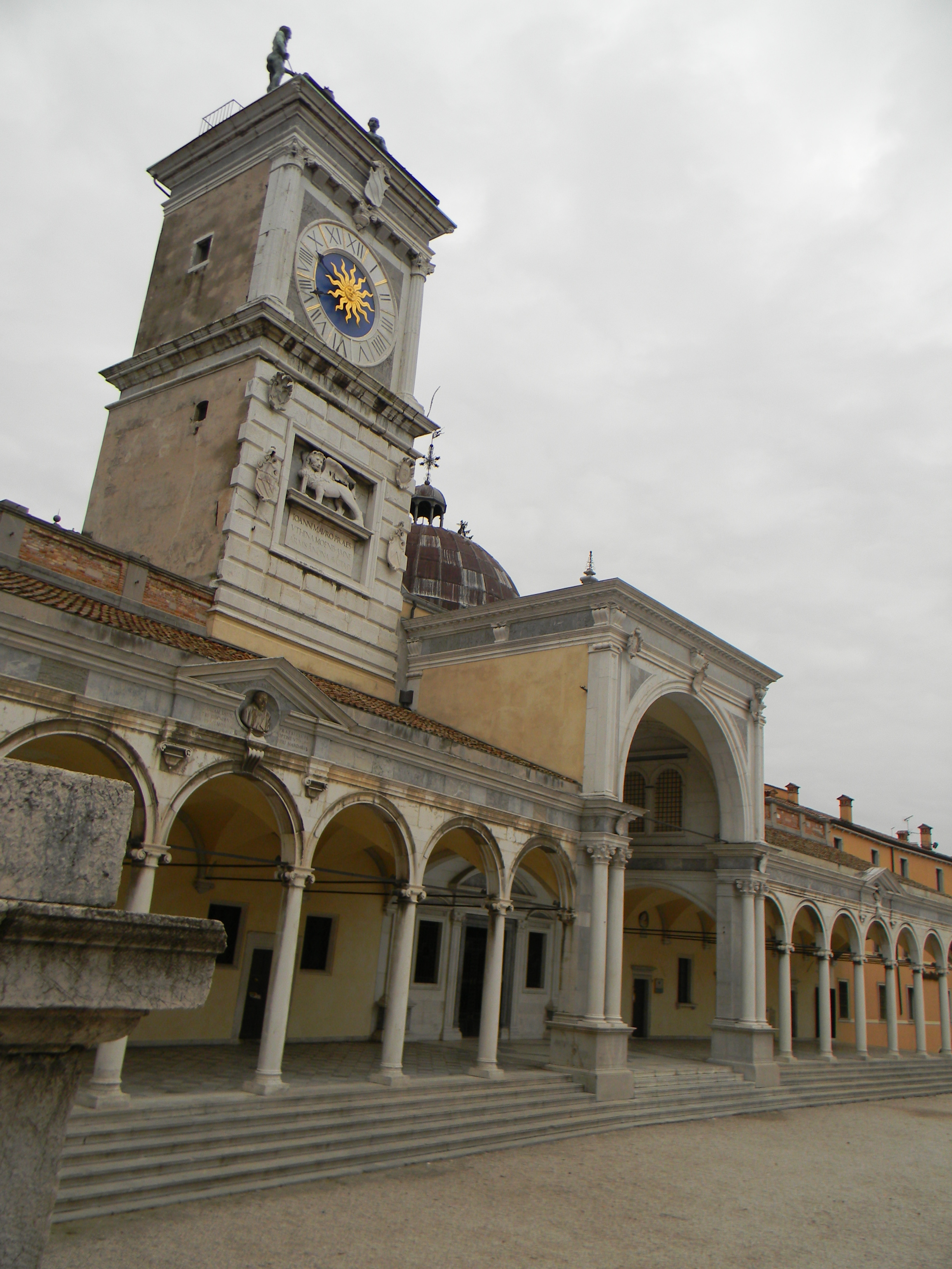 Porticato di San Giovanni di Udine